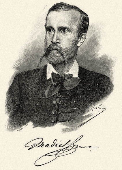 Madách Imre. Morelli Gusztáv fametszete. Megjelent Az Osztrák-Magyar Monarchia írásban és képben (1887–1901) kiadványban